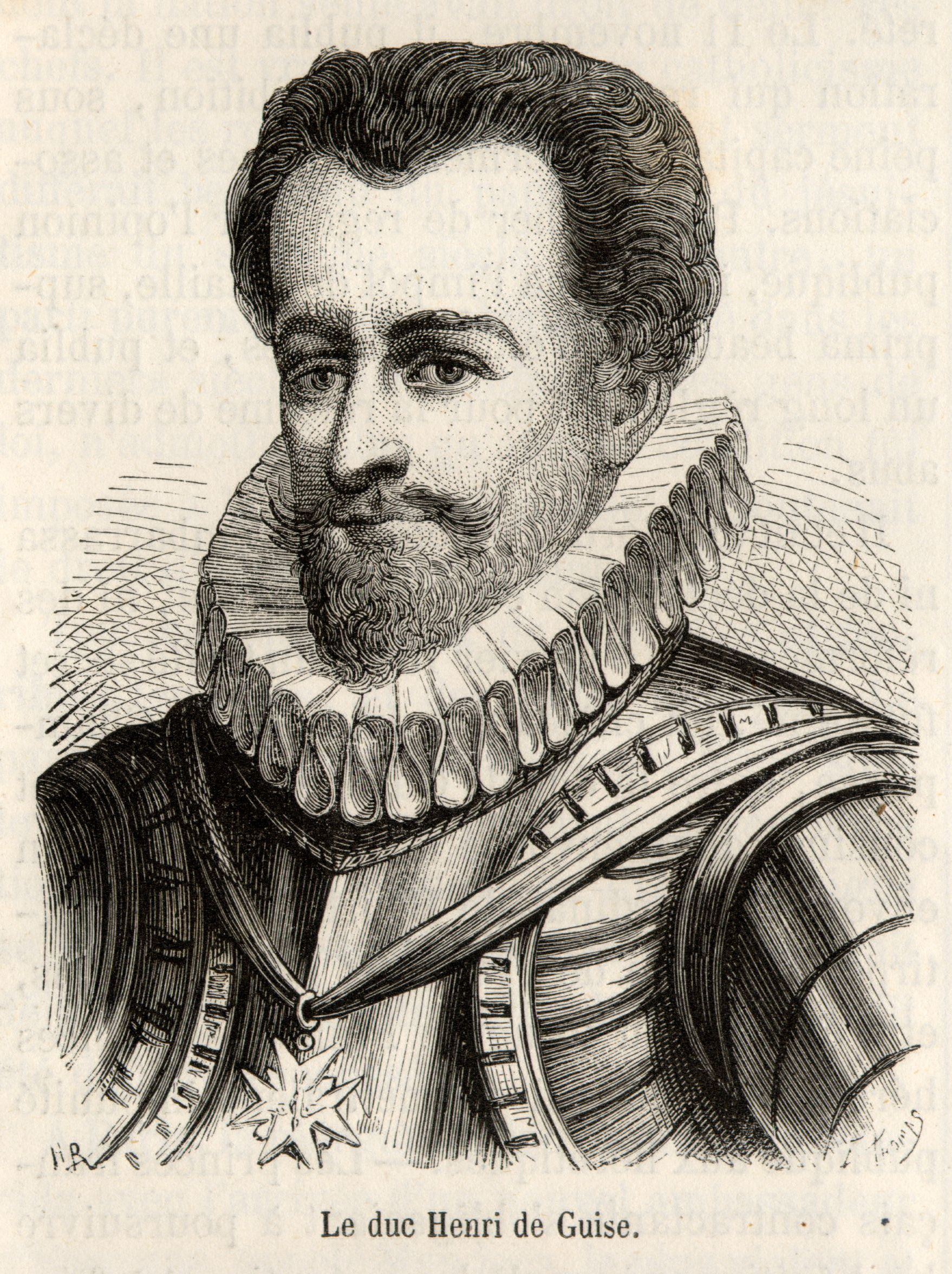 Duc Henri de Guise